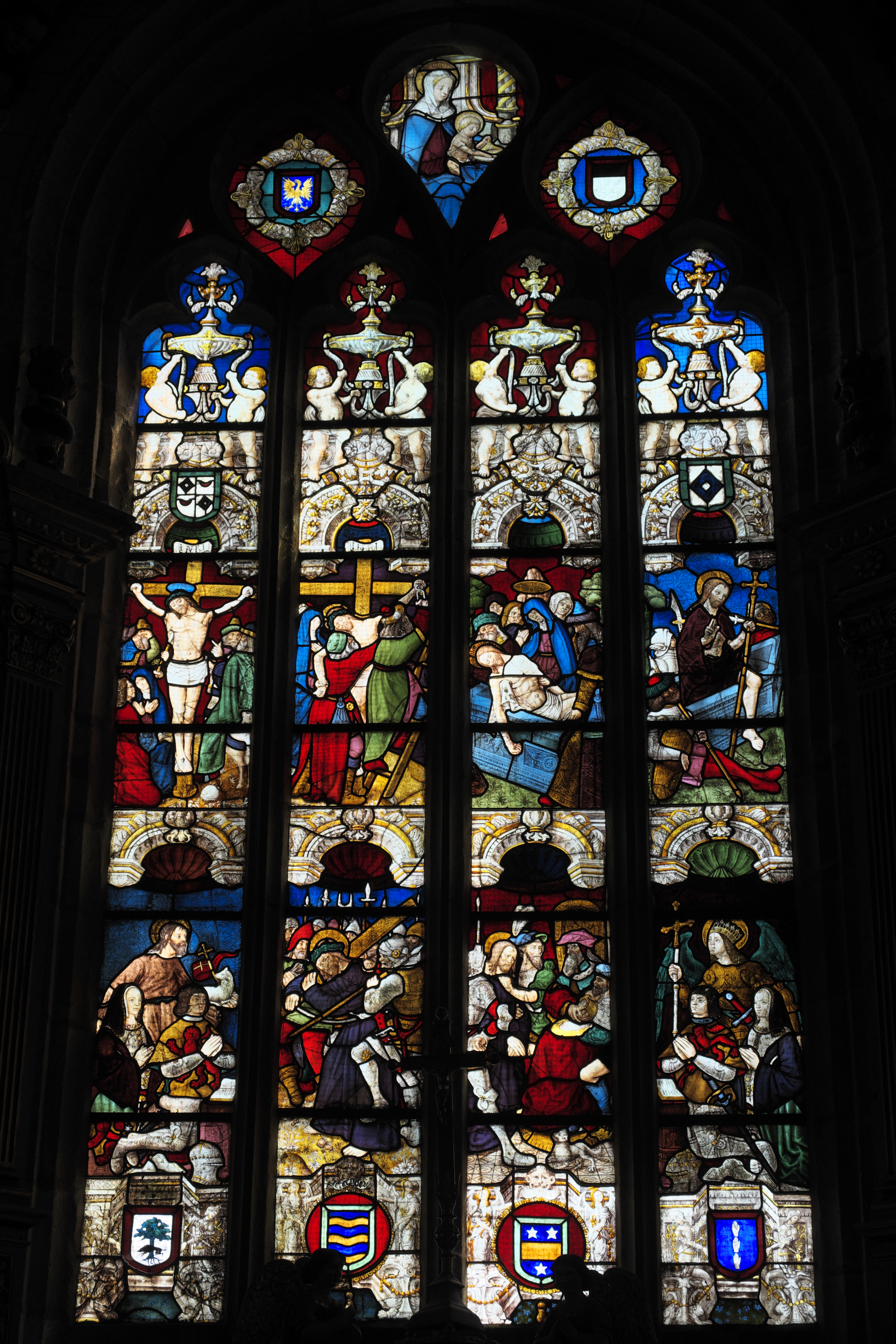 Katholische Pfarrkirche Saint-Thurien in Plogonnec im Département Finistère (Region Bretagne/Frankreich), Bleiglasfenster (baie 0) um 1520; Darstellung: Szenen der Passion und Auferstehung Christi; unten: Stifter mit Schutzpatronen und Wappen